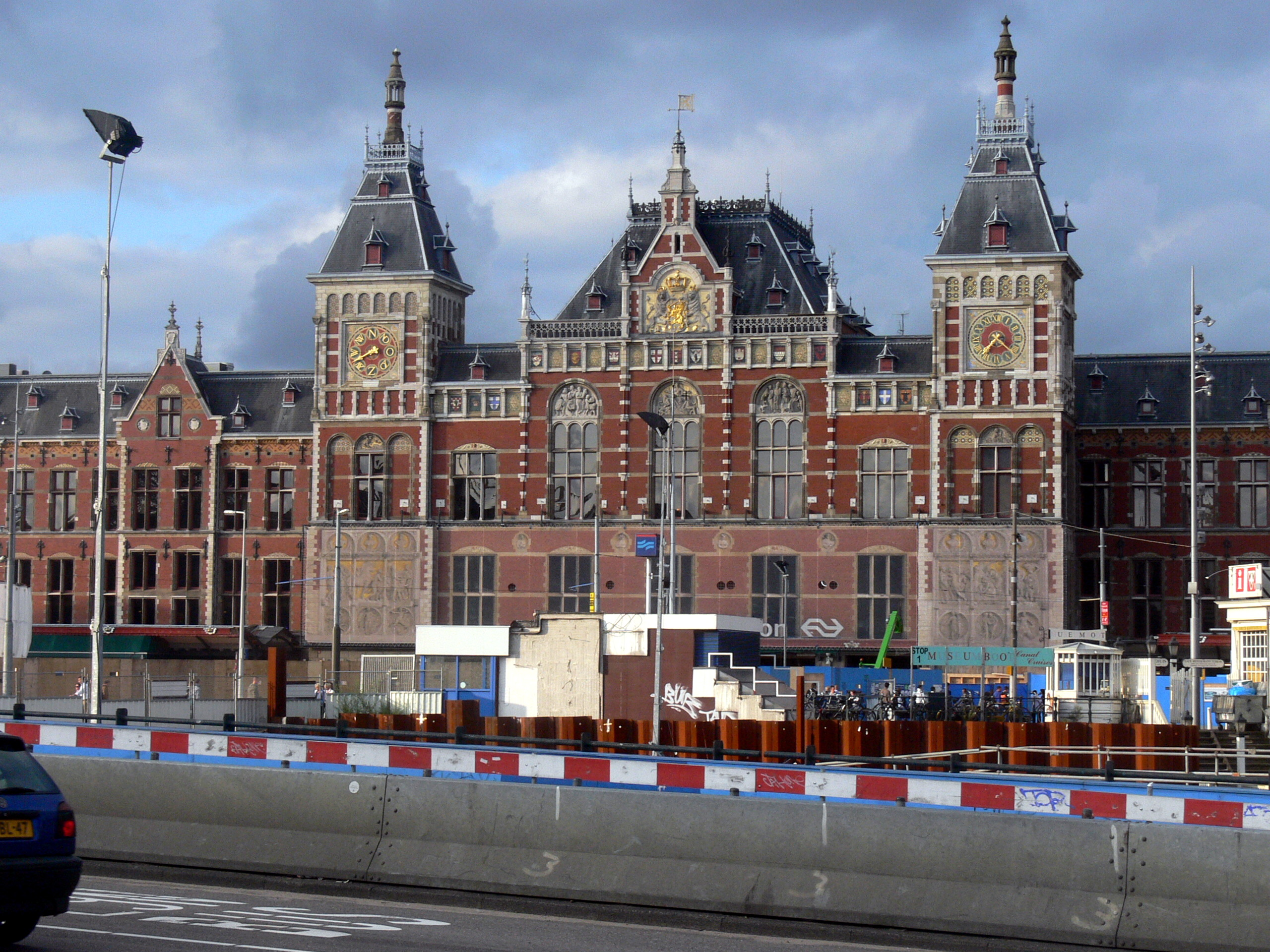 Amsterdam Central Station. Fassade.